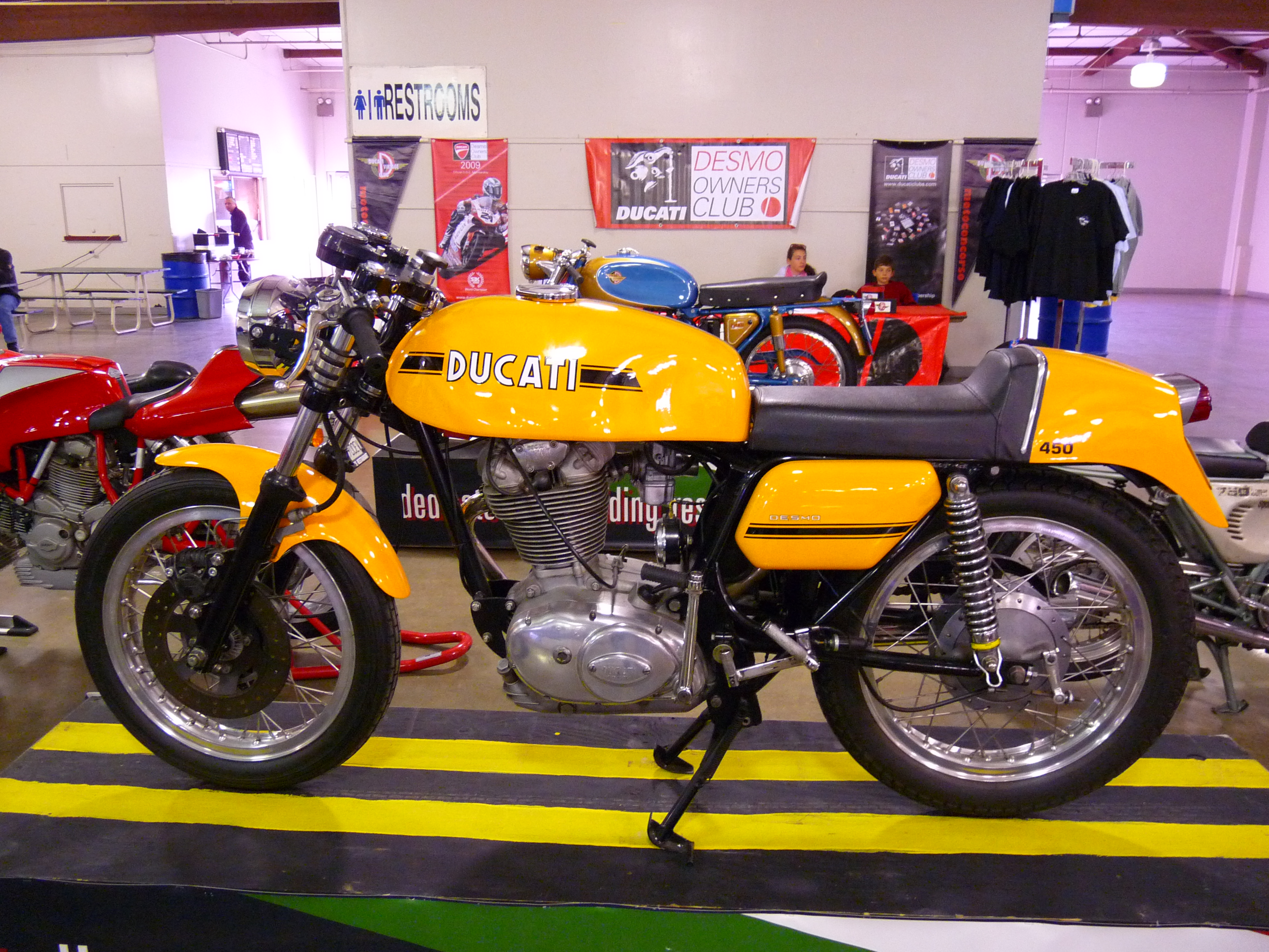 Ducati Desmo 450 2ª serie (1973-1975)